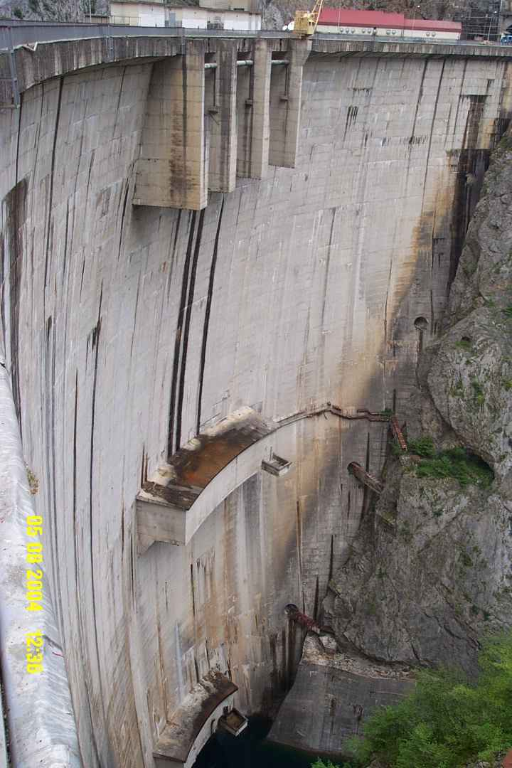 The Mratinje dam in Montenegro - Mratinjská přehrada v Černé Hoře